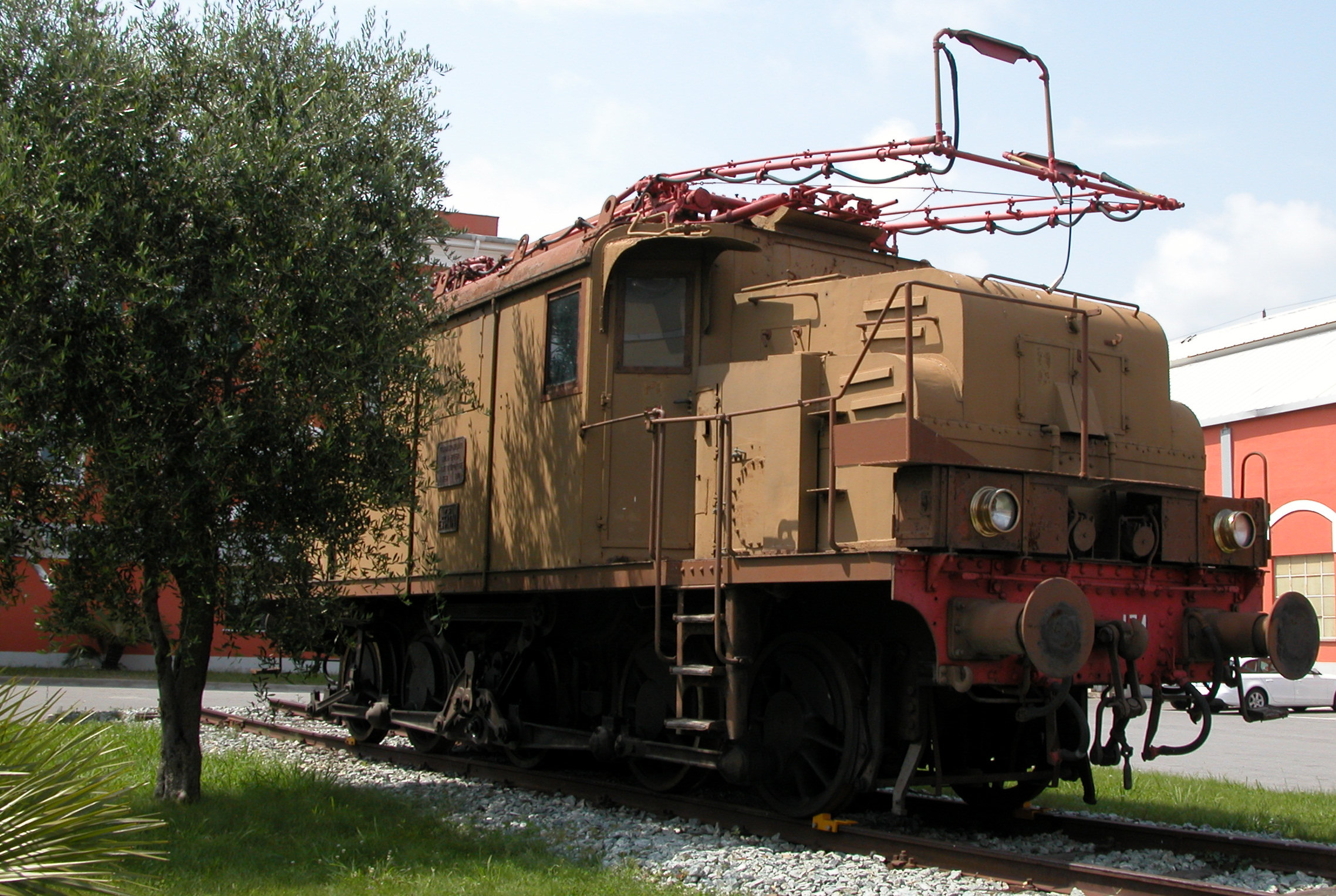 Locomotiva E.554.174 esposta nello stabilimento Bombardier (ex Tecnomasio Italiano Brown Boveri) di Vado Ligure.